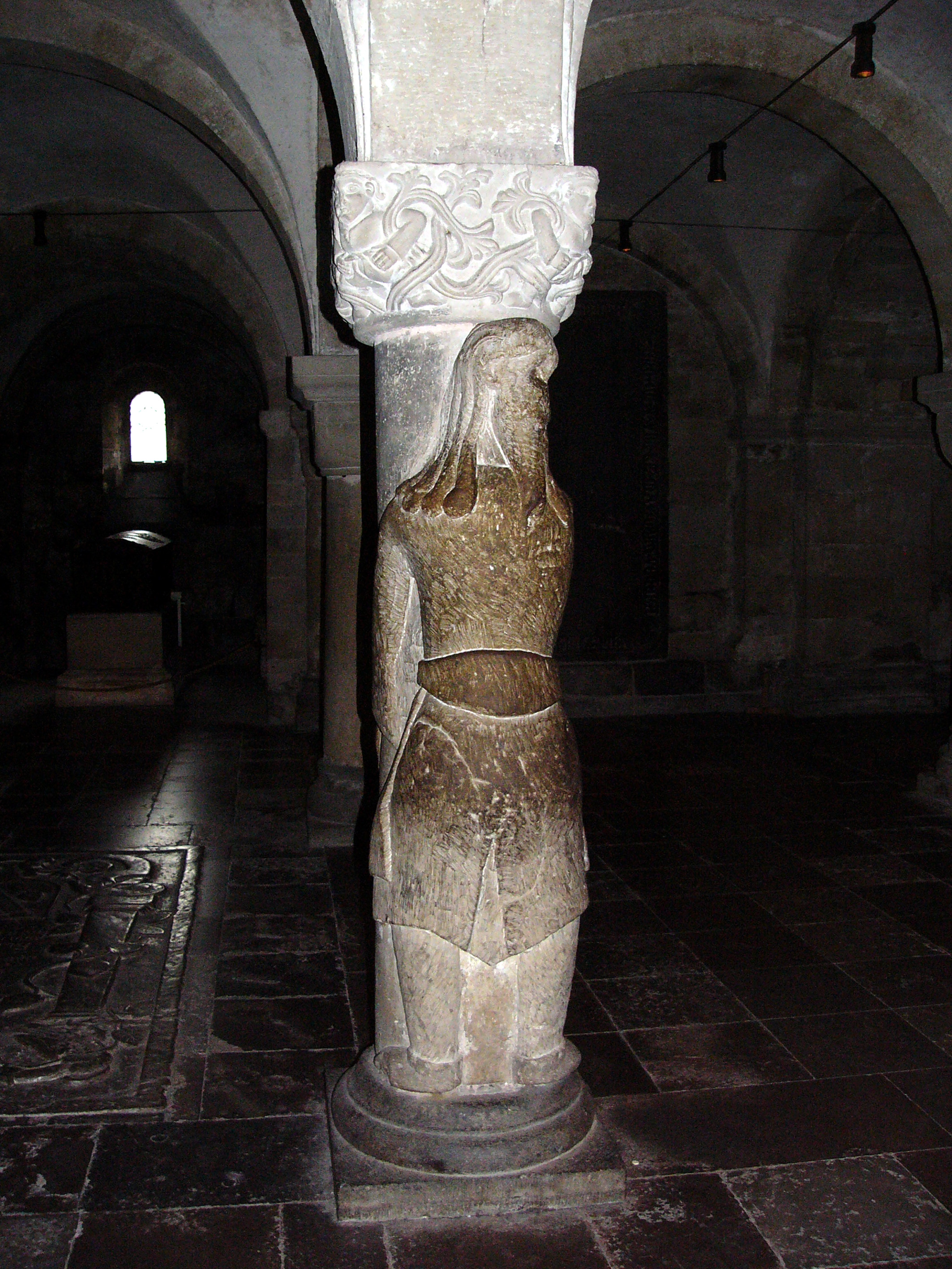 1103/04 errichtete Papst Paschalis II. auf dänische Initiative das Erzbistum Lund. Dom zu Lund. "Finn"-Skulptur in der Krypta. Es handelt sich um einen Riesen, mit dem St. Laurentius einen Pakt zum Bau der Kirche abgeschlossen haben soll, infolgedessen er seine Augen verlöre, wenn er des Riesen Namen nicht bis zur Fertigstellung errate. Er belauschte die Frau im Gespräch mit ihrem Sohn und hörte den Namen "Finn". Er rief den Riesen beim Namen, worauf er und seine Familie in die Krypta sprangen und dort zu Stein erstarrten.